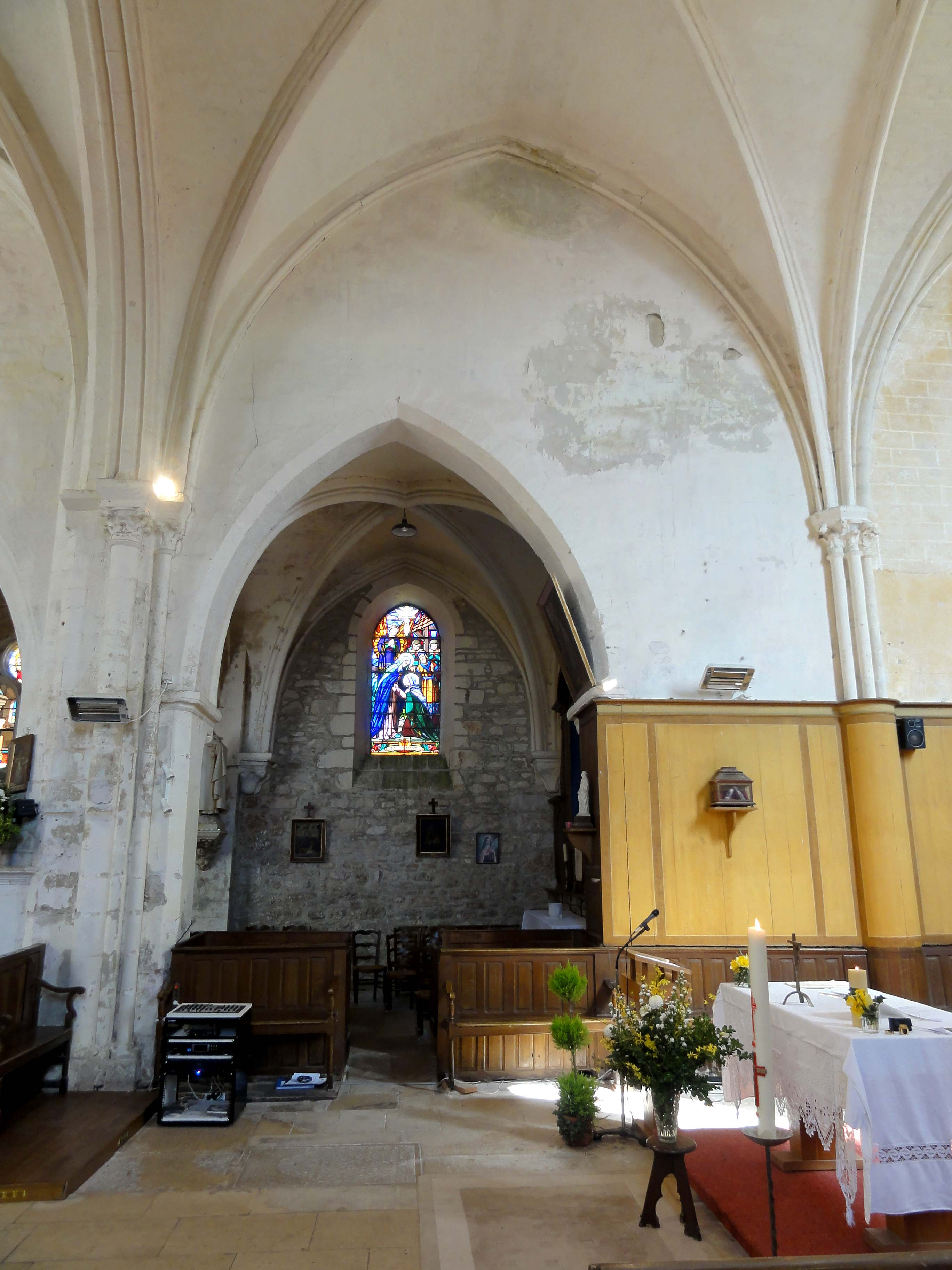 Intérieur de l'église (voir titre).